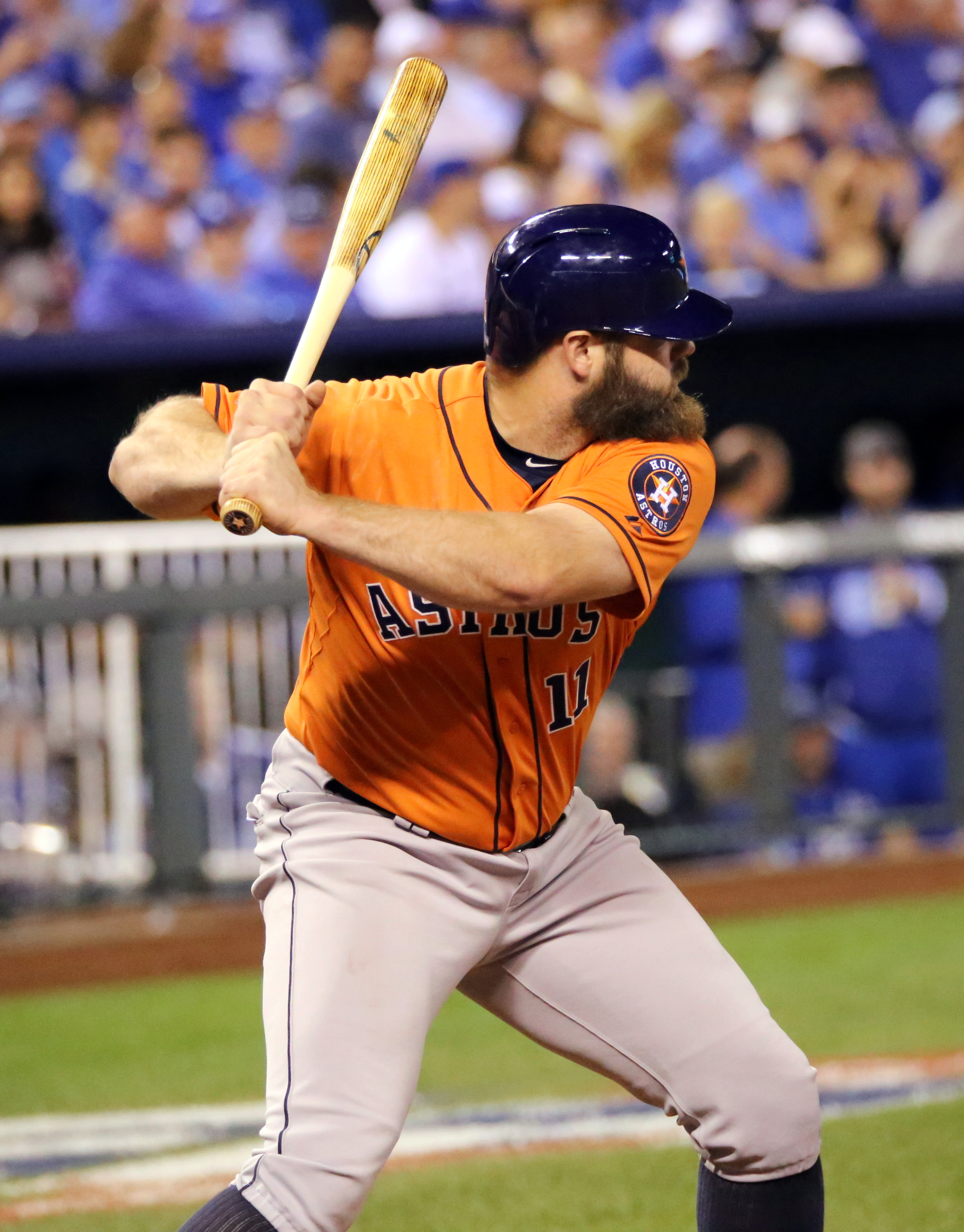 Evan Gattis